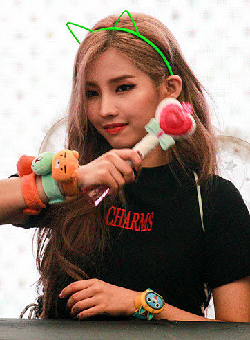 6월 2일 (여자)아이들 팬사인회